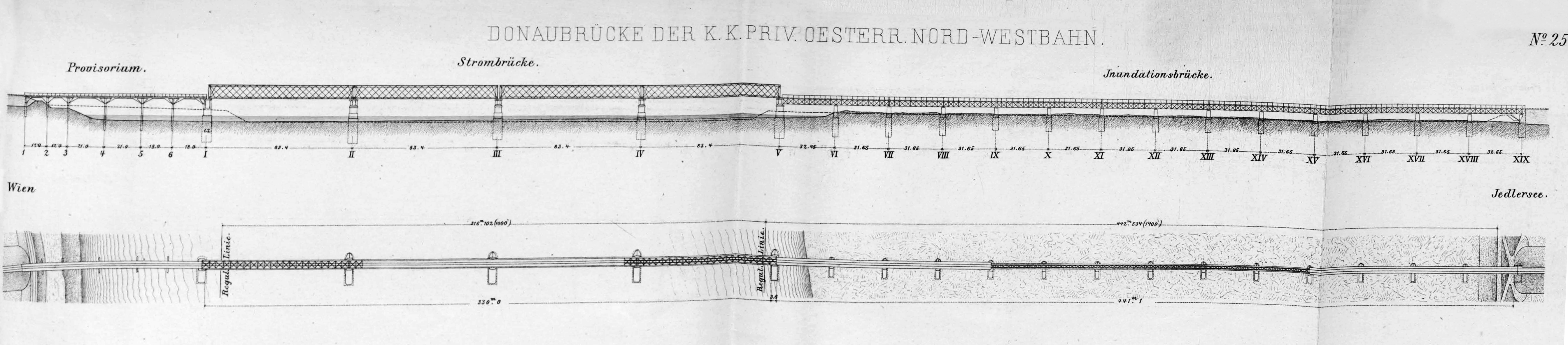 Wien, (ehemalige) Nordwestbahnbrücke, Auf- und Grundriss, Plan 1872